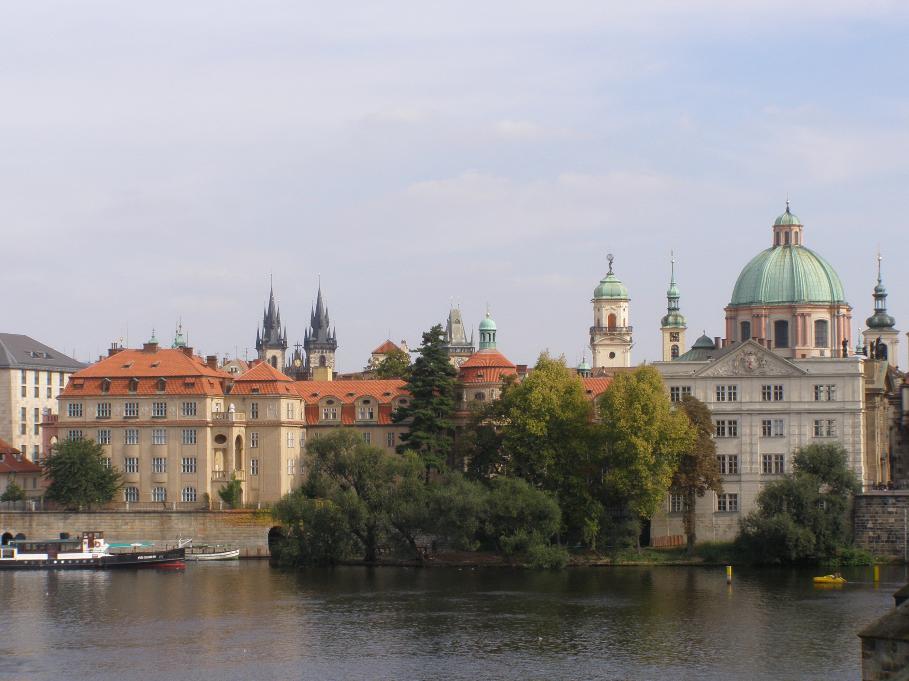 Praha, pohled z Karlova mostu na areál křižovníků (Křižovnická 1)